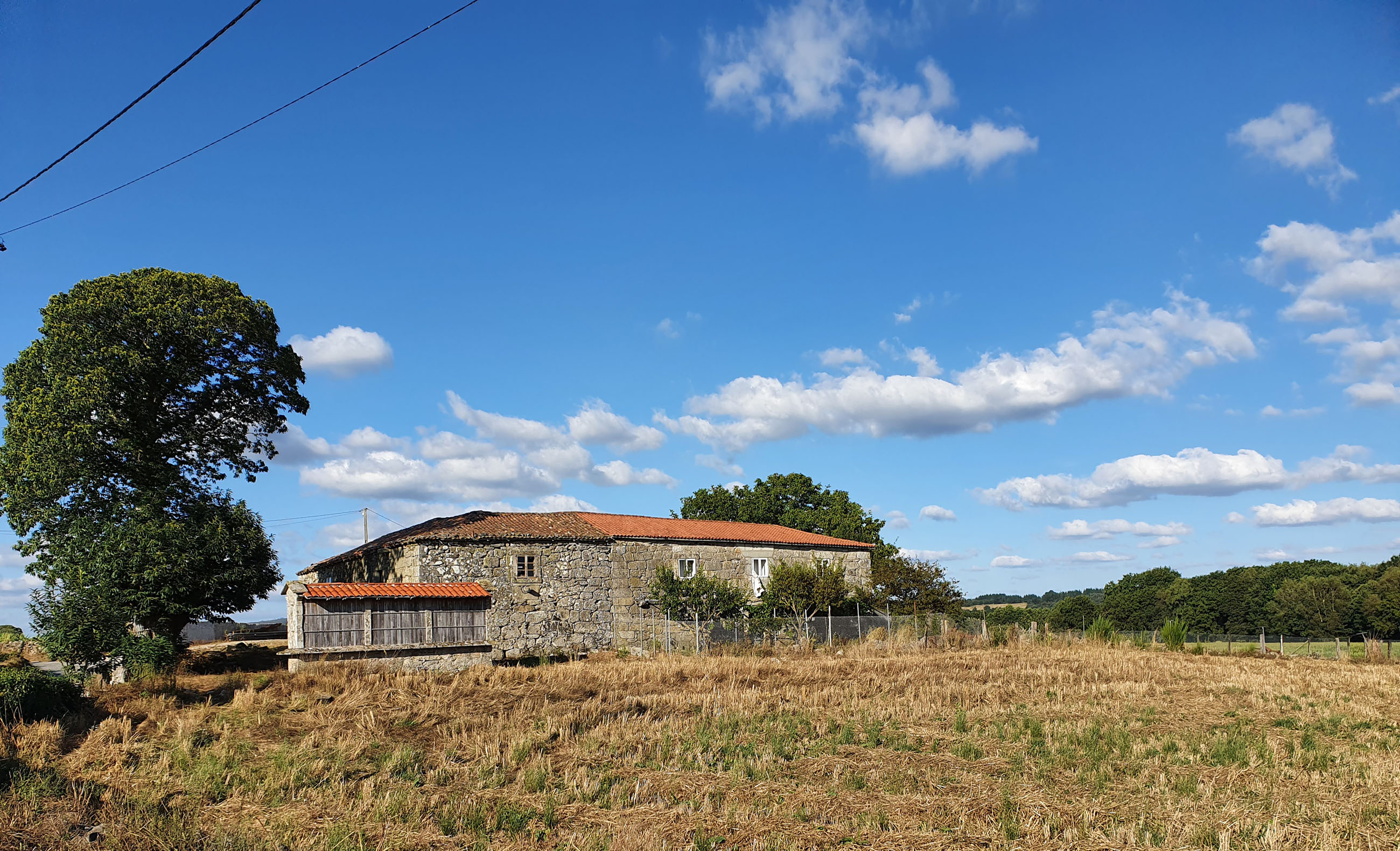 A Ermide, lugar da parroquia de Olveda (Antas de Ulla). Na imaxe un hórreo de tres claros, sobre soleira de mampostería.